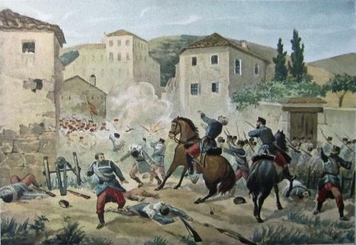 Acción de Alpens